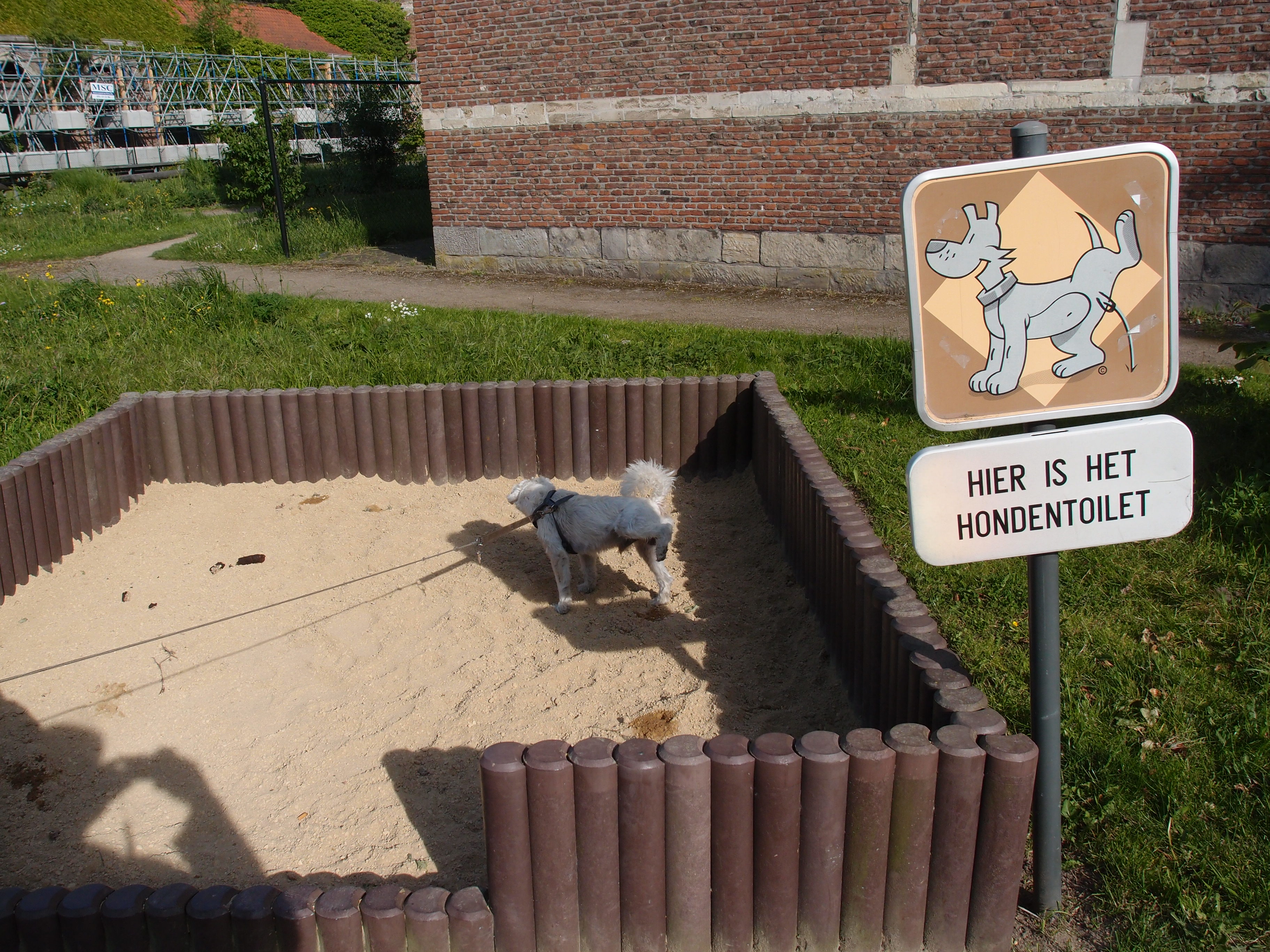 Ein Westiepoo uriniert ordnungsgemäß auf einer Hundetoilette in Gent (Belgien)